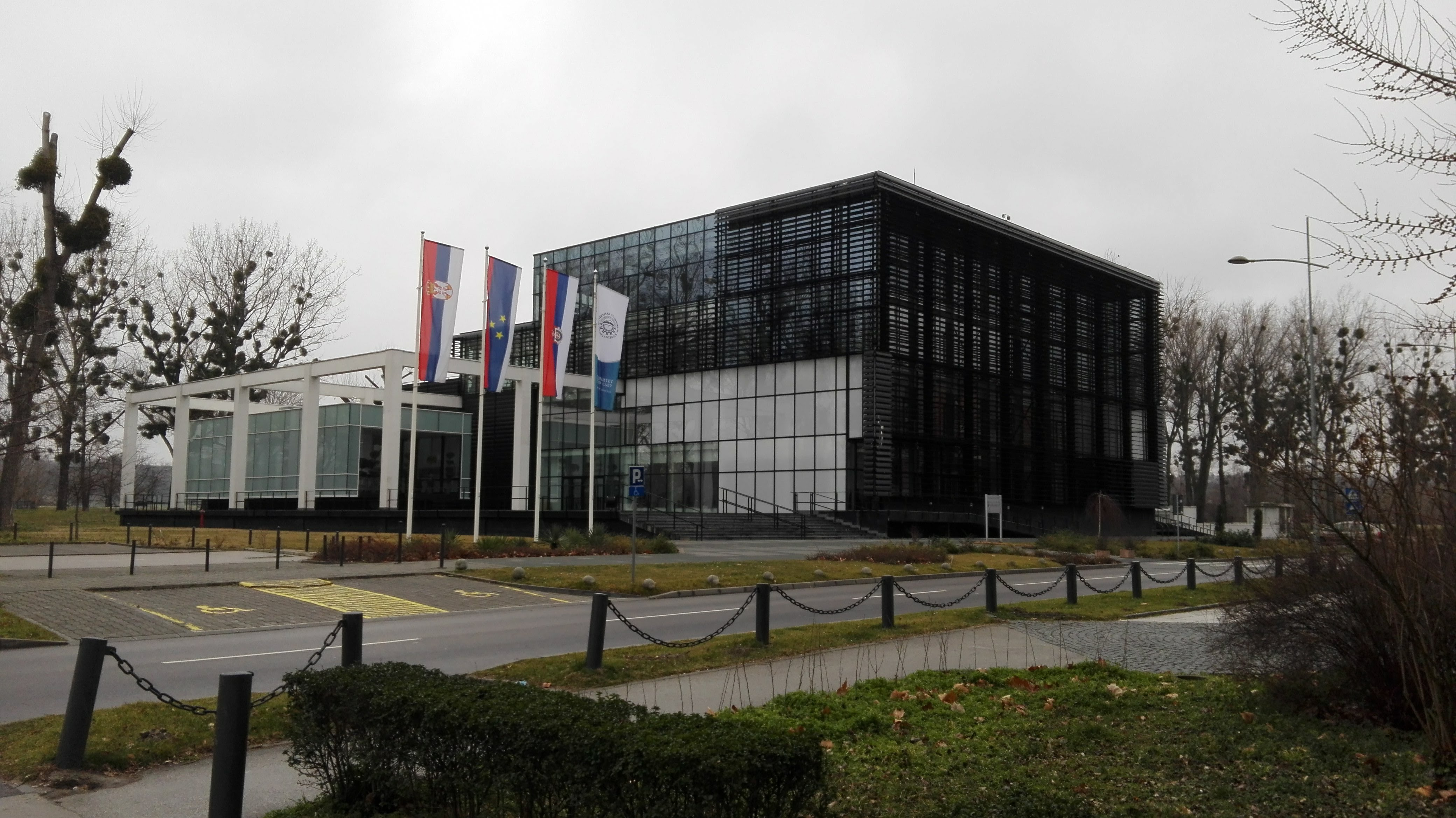 Зграда ректората Универзитета у Новом Саду